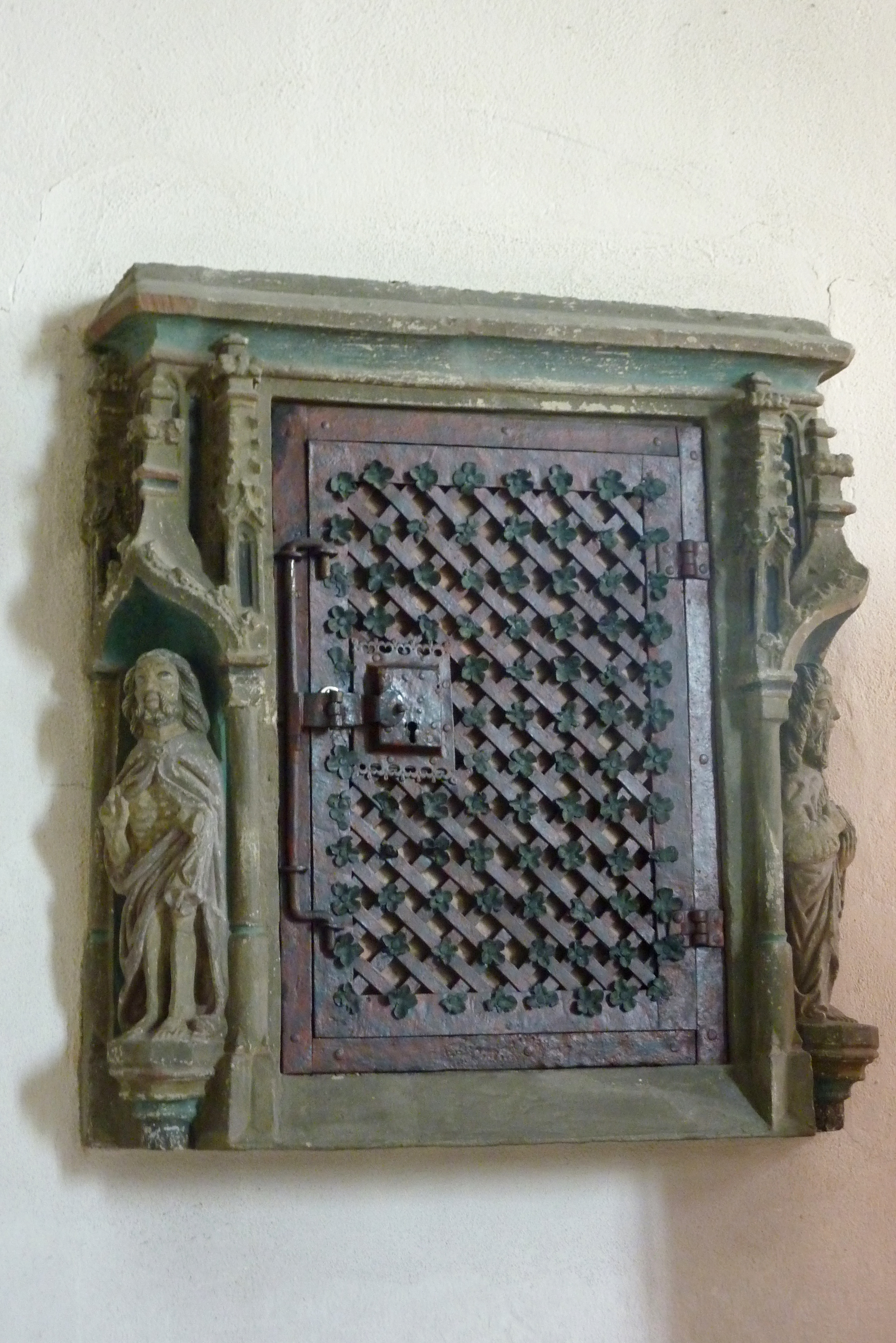 katholische Stadtpfarrkirche St. Peter und Paul in Grünsfeld im Main-Tauber-Kreis (Baden-Württemberg), Hauptstraße 18